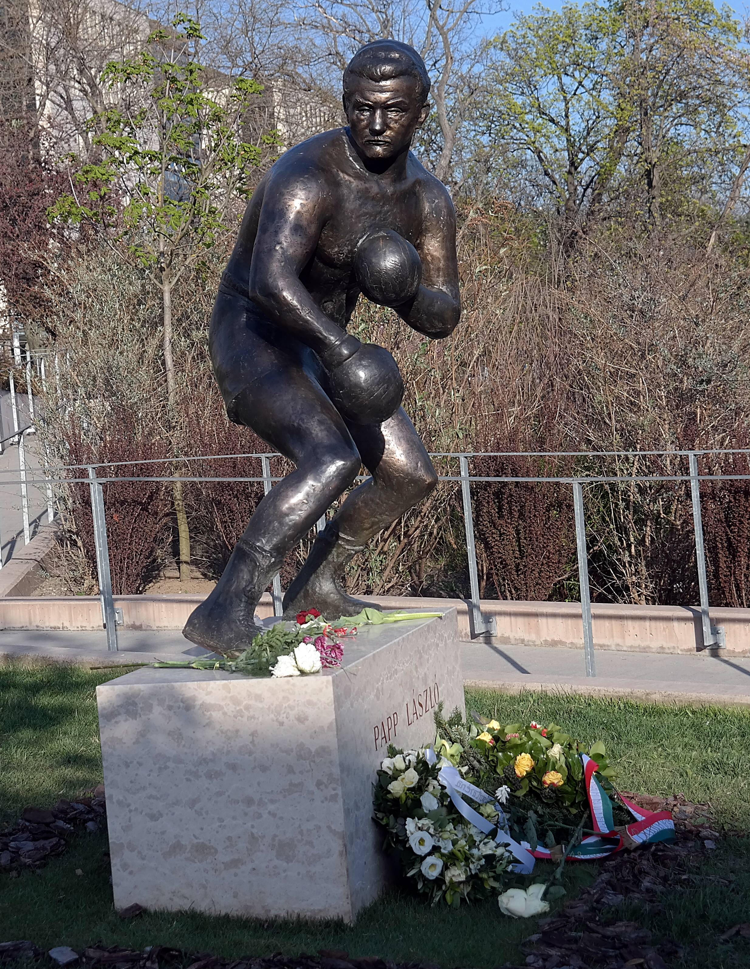 Papp László-szobor (Budapest, XII. Gesztenyéskert, Csörsz utca és Sirály utca kereszteződésének közelében). Fekete Géza Dezső alkotása